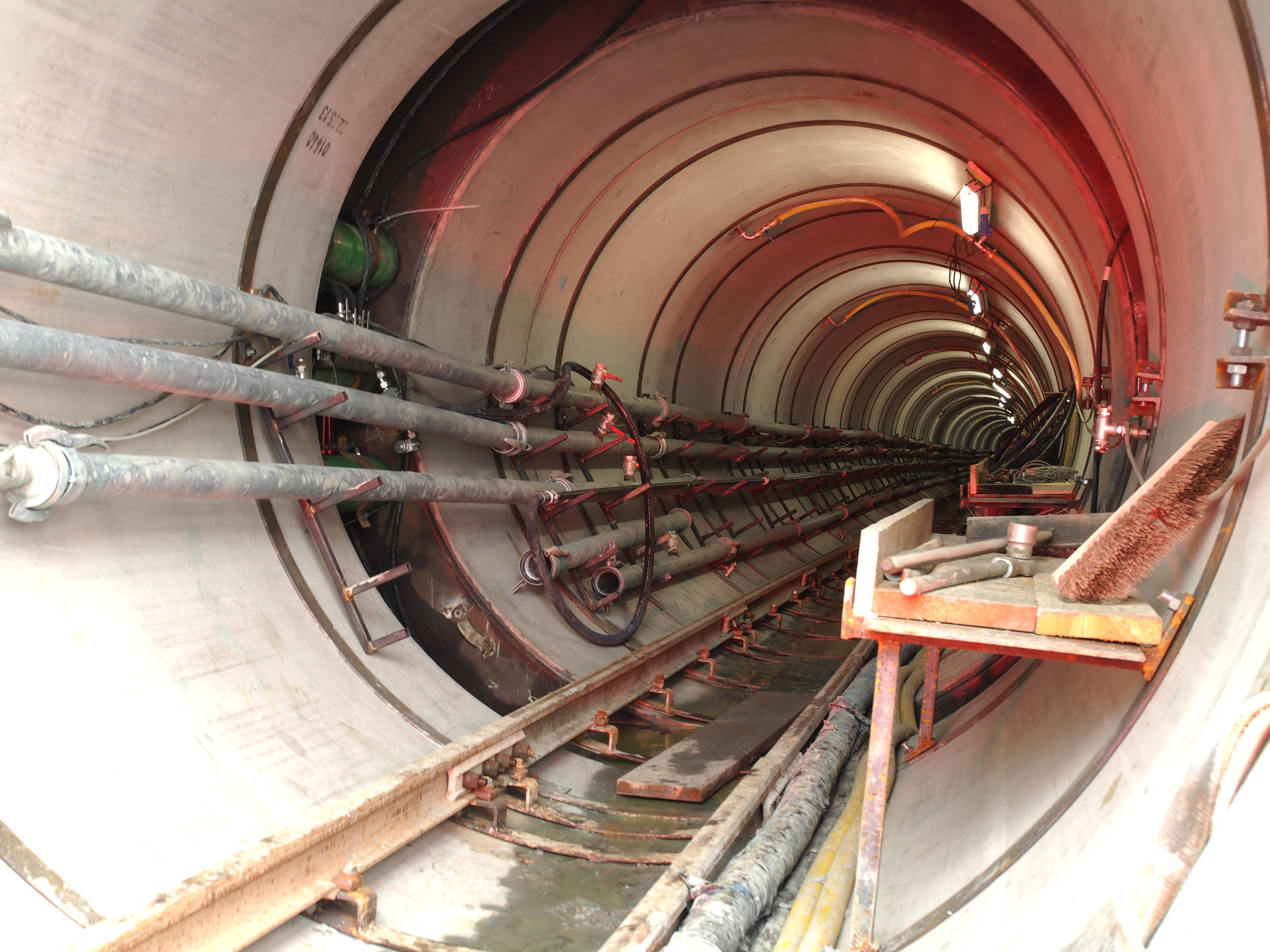 Der im Bau befindliche Emscherkanal bei Schacht 52, Blick in Fließrichtung, Betonröhren im Tunnelvortrieb